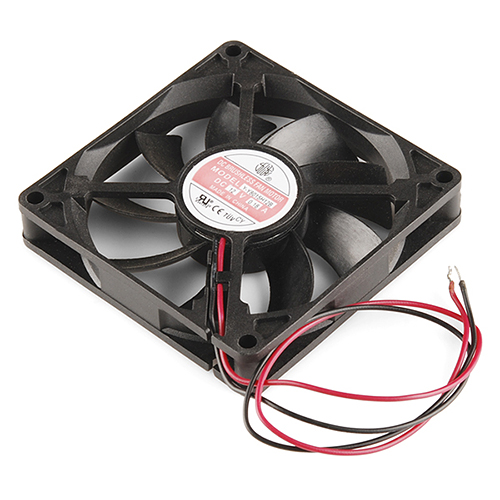 11718 - DC Brushless Fan - 80x80x15mm (12V)